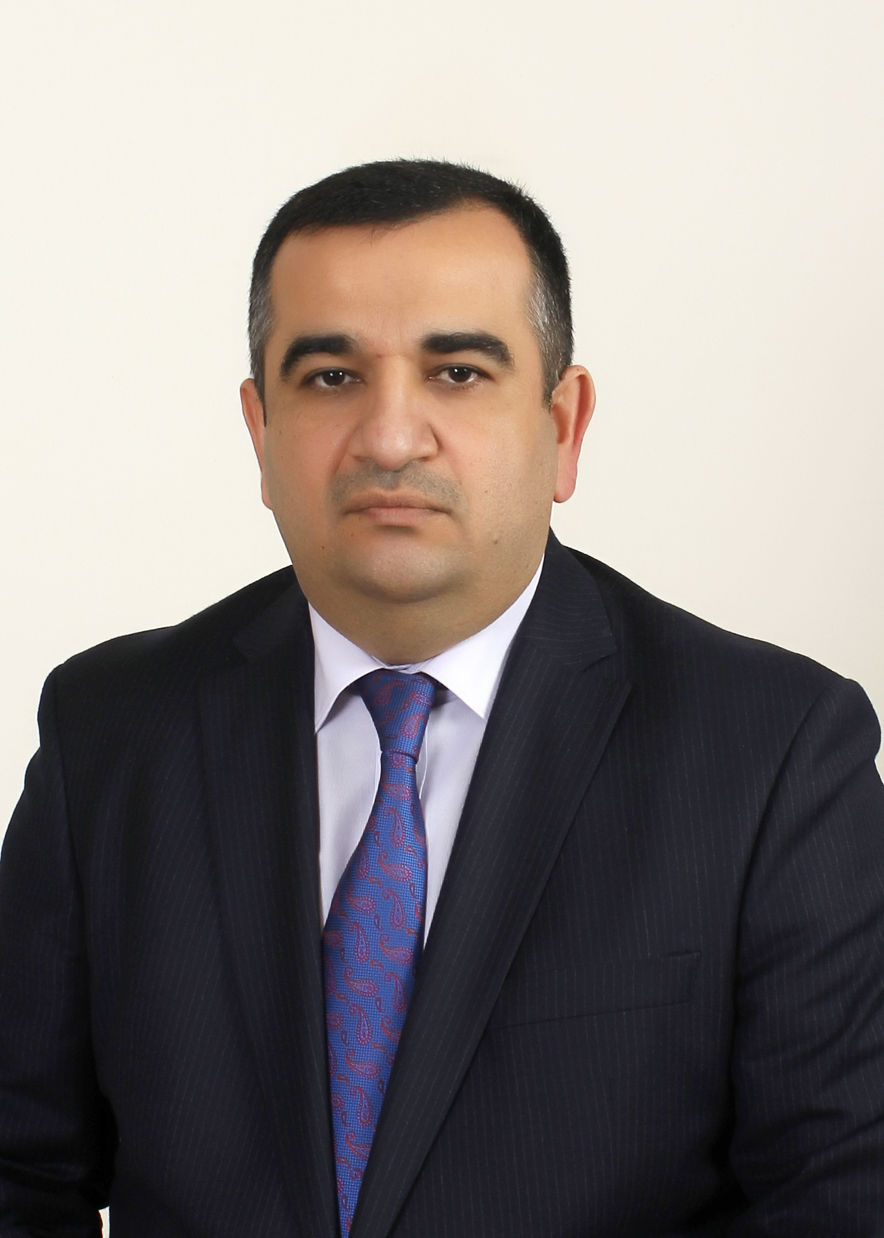 Cavid İsmayıl (tam adı:İsmayıl Cavid Əjdər oğlu; 1 iyun 1972, Çomaxtur, Naxçıvan MSSR) — Azərbaycan iqtisadçısı, hüquqşunas. İqtisad üzrə fəlsəfə doktoru